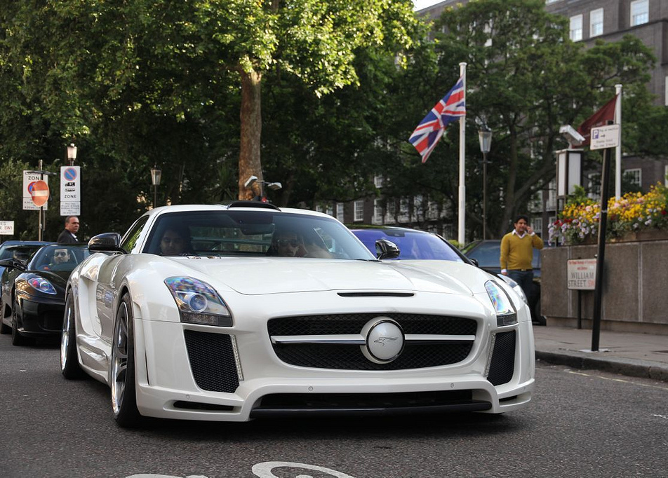 Mercedes-Benz SLS AMG FAB Design @ London